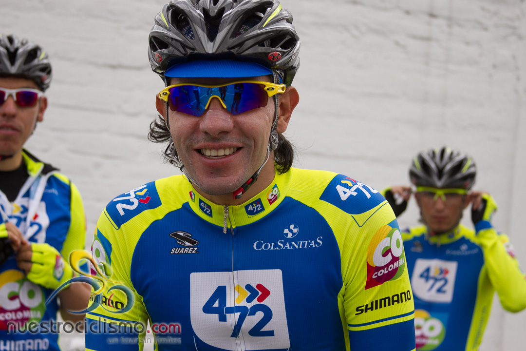 Carlos Urán2ª. Eta. Vuelta a Colombia 2013Ibarra - Ipiales 134KmLunes 10 de junio de 2013